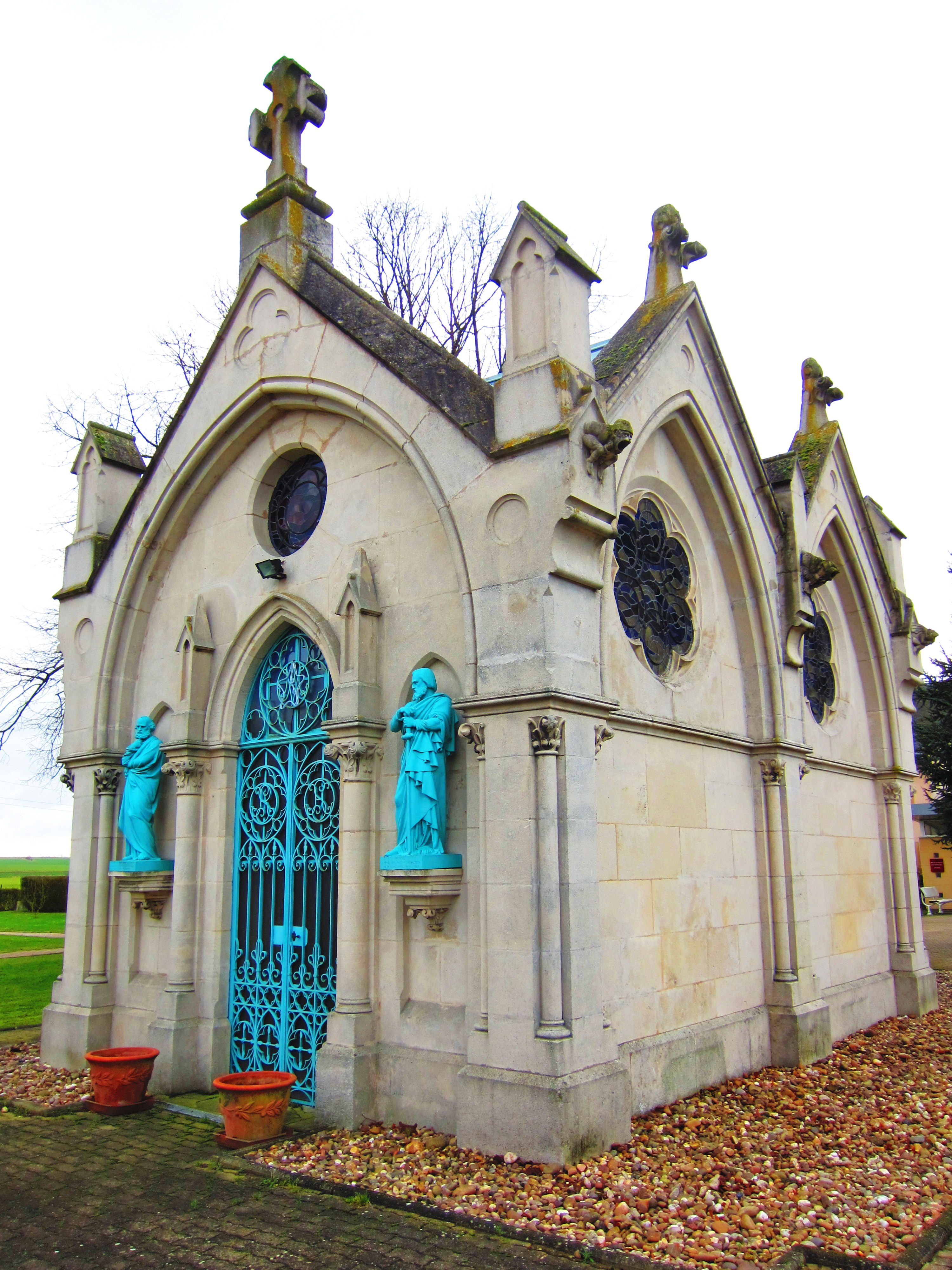 Description chapelle st dominique Mars la Tour chapelle st dominique Mars la Tour